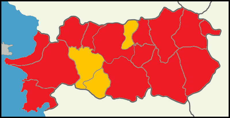 Aydın'da 2014 Türkiye cumhurbaşkanlığı seçimi